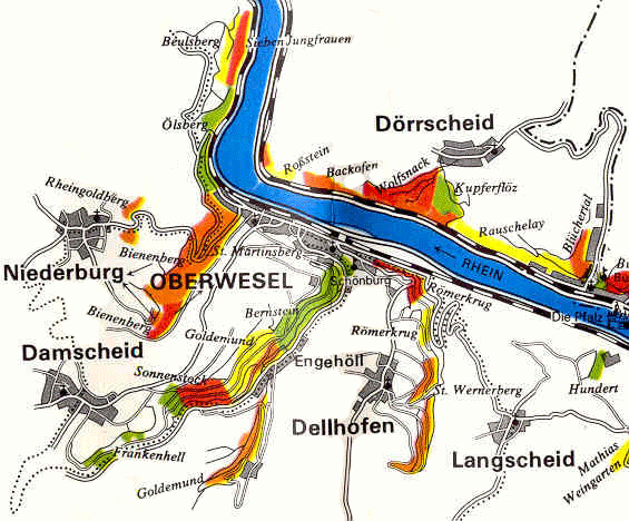 Übersichtskarte der Oberweseler Lagen